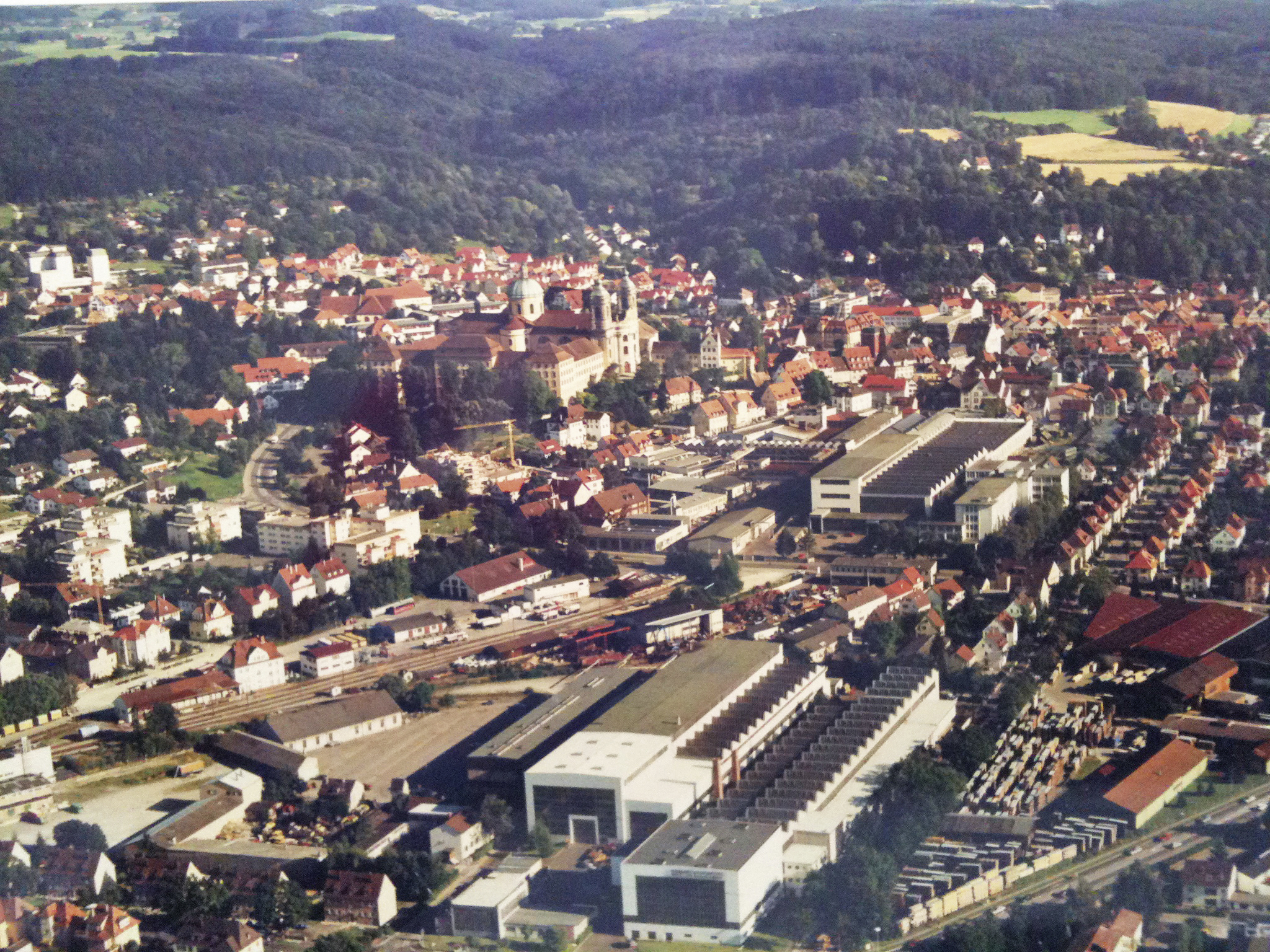 Luftaufnahme Weingarten (Württ.) mit Basilika und Müller Weingarten Werksgelände